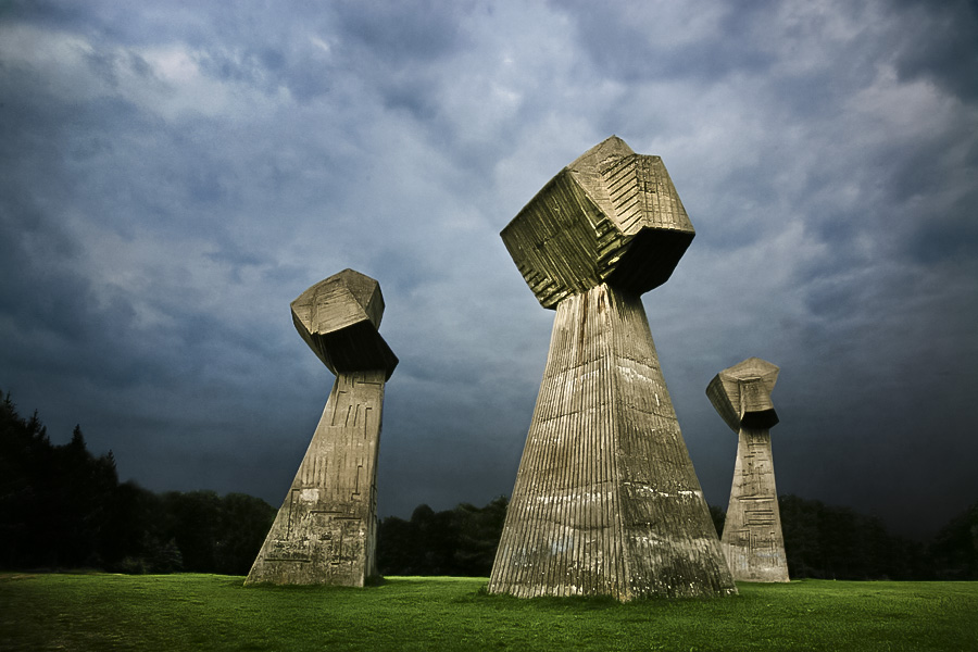 Спомен парк Бубањ представља спомен-комплекс саграђен као сећање на стрељане грађане Ниша и јужне Србије у Другом светском рату и налази се у нишкој општини Палилула.